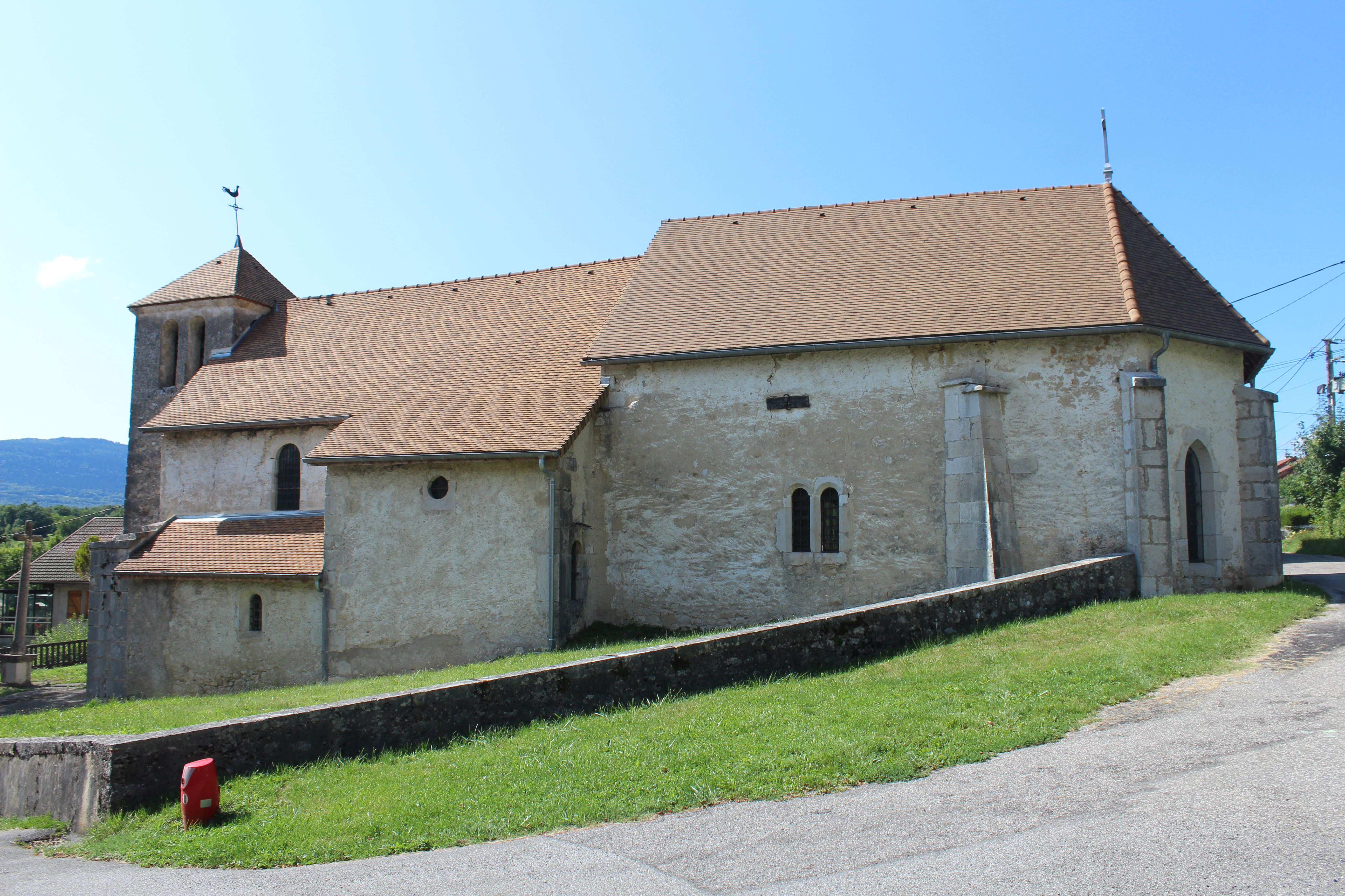 Église Saint-André de Chavornay, Ain.